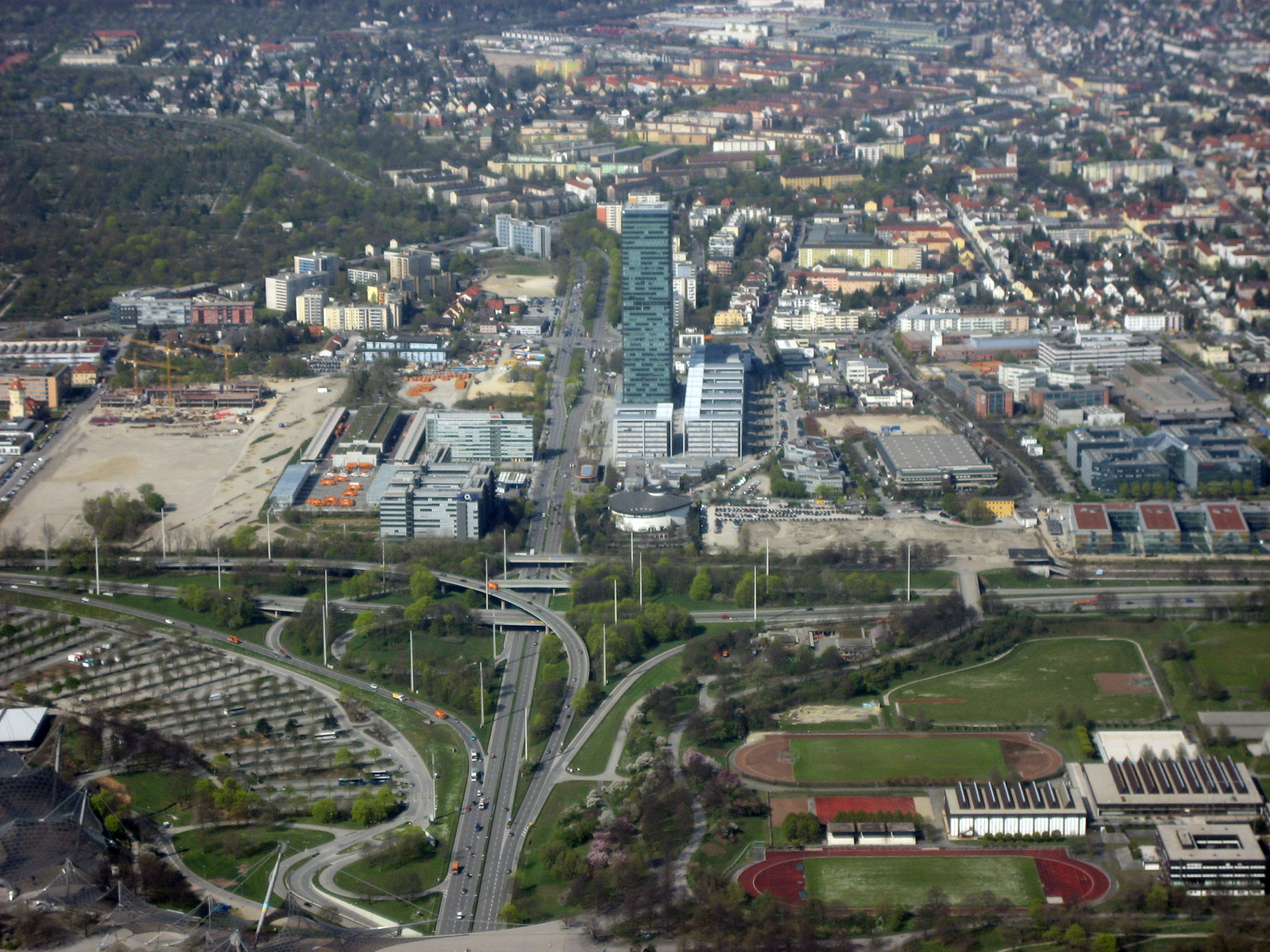 Luftbild des Münchner Stadtteils Moosach mit der Zentralen Hochschulsportanlage und der Parkharfe des Olympiaparks sowie der O2-Zentrale im Vordergrund